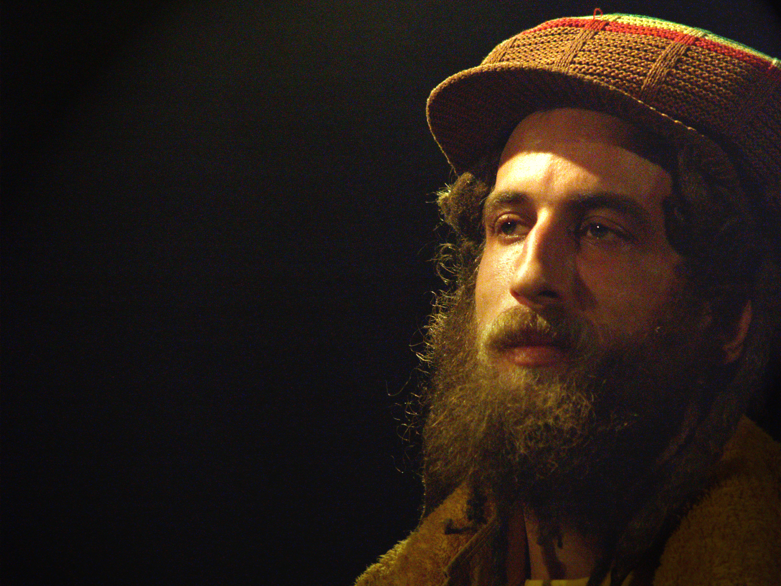 Le musicien français Manjul.